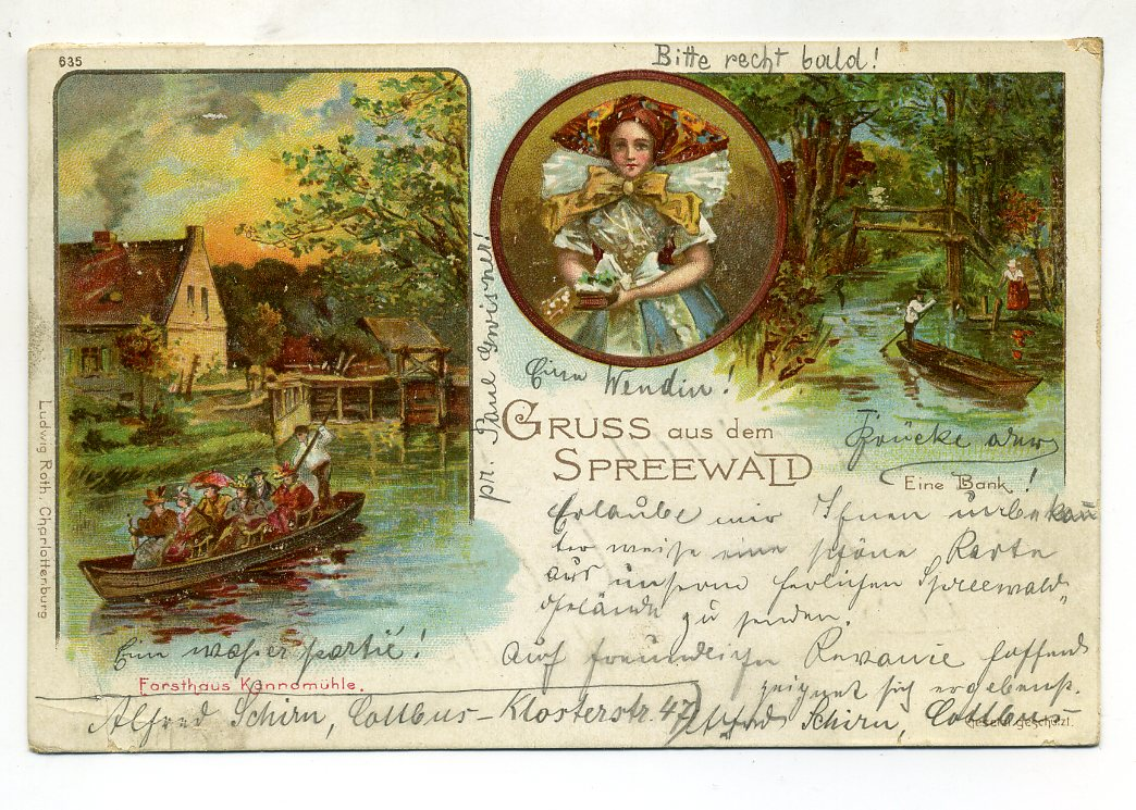 Gruss aus dem Spreewald -1899 -1899 -Eine Bank -Forsthaus Kannomühle